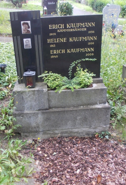 Erich Kaufmann Neustifter Friedhof (6-14-21)